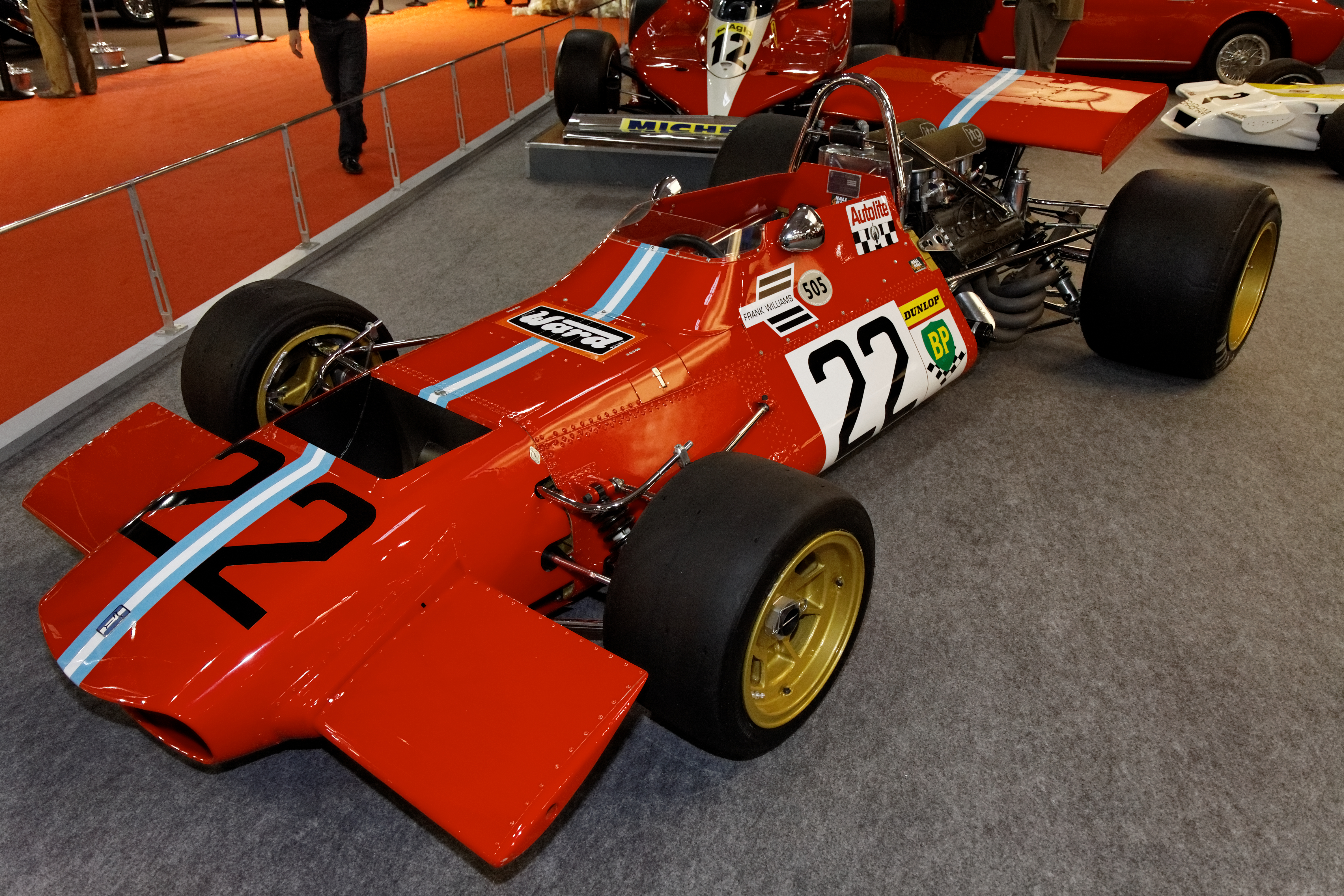 Ferrari 206 SP